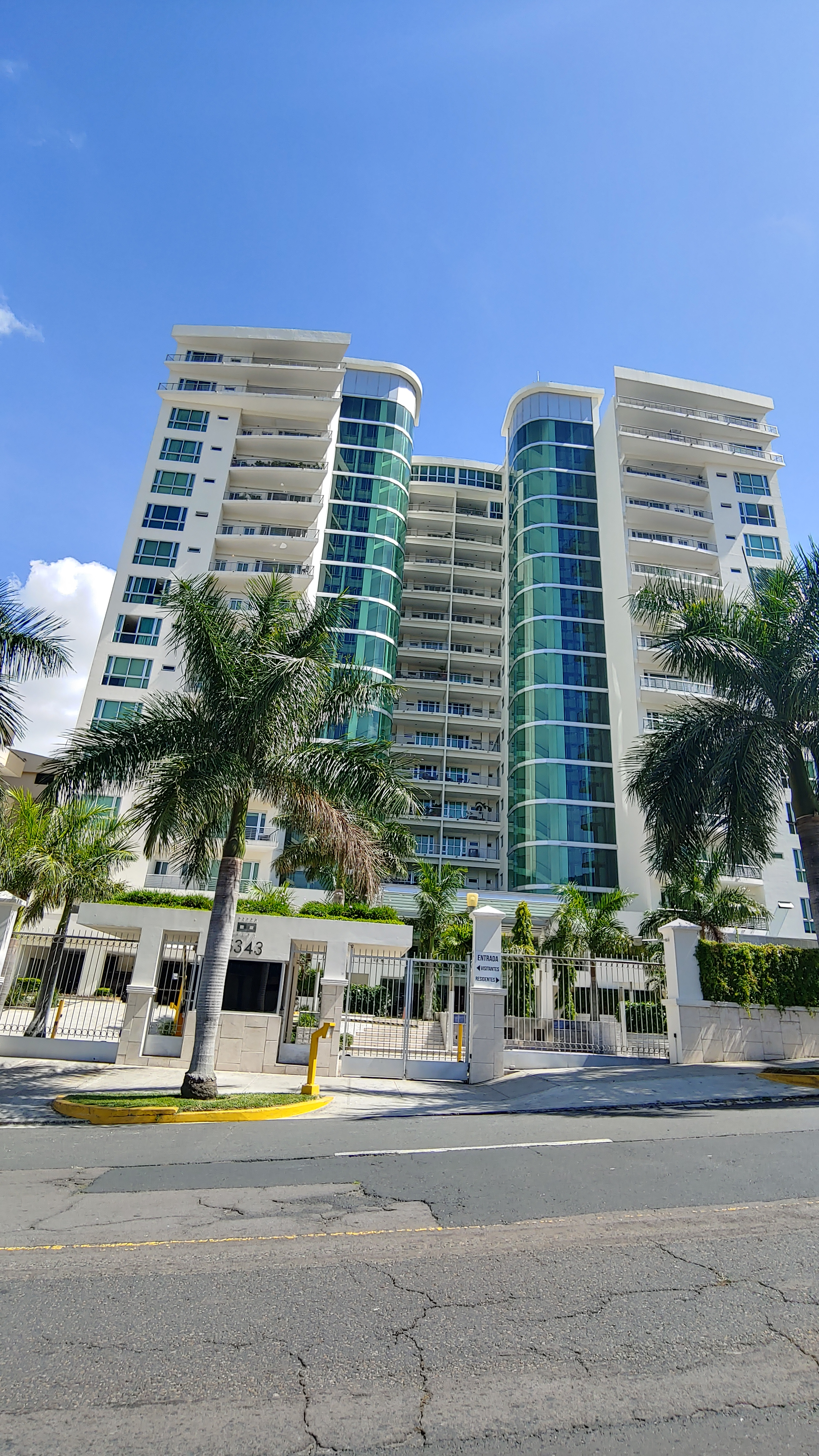 Nueva imagen Torre Terra Alta